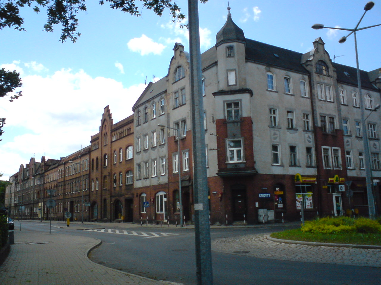 Kamienice (tenement) in Zatorze (Okrzei Str.), Żary